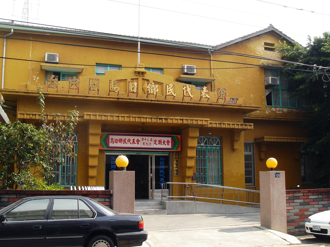 前烏日鄉民代表會（原 烏日庄役場）。